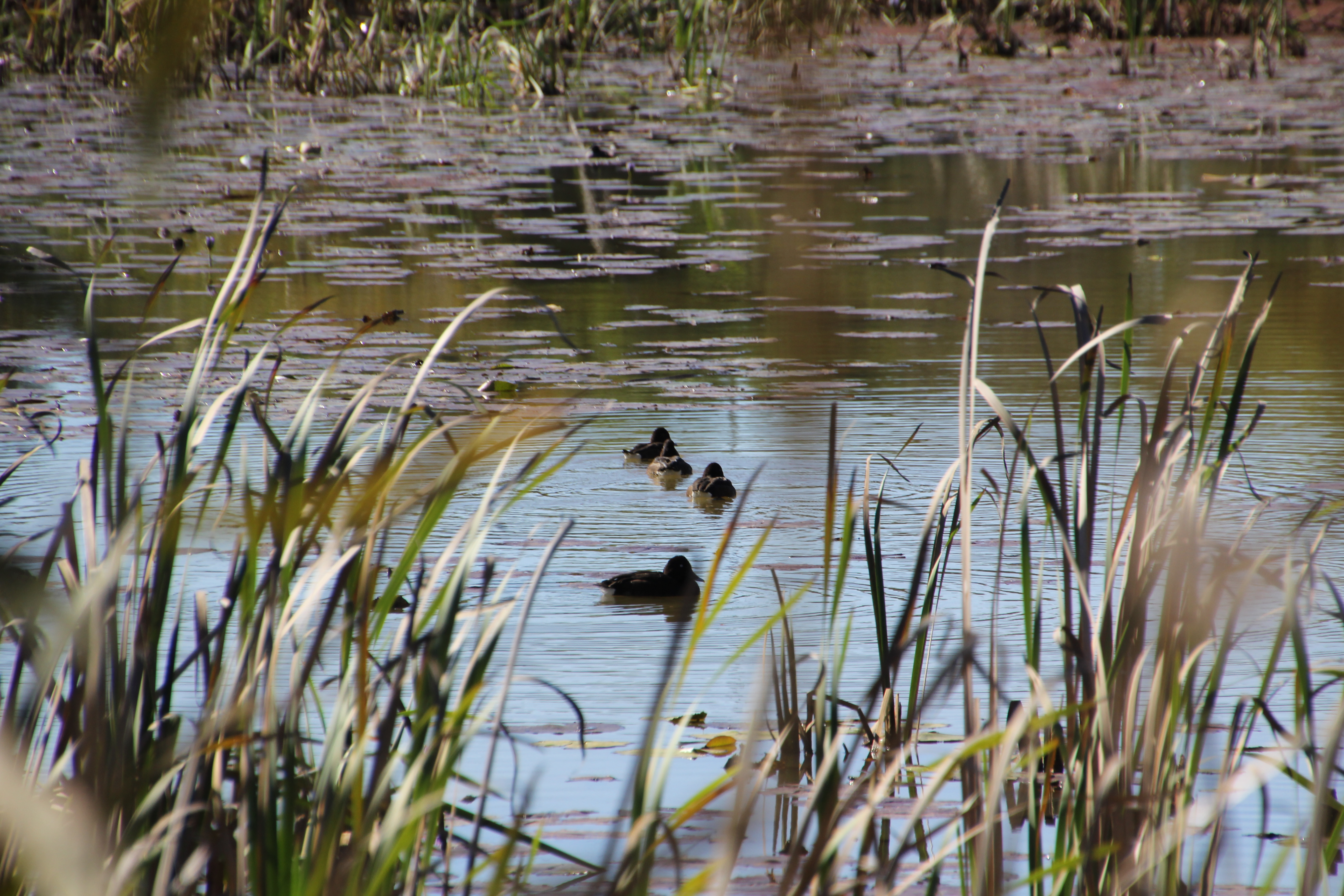 Paradise Road Larapinta wildlife